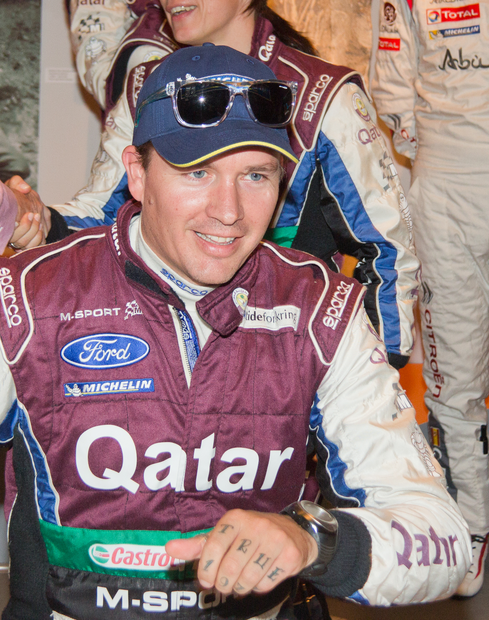 ADAC Rallye Deutschland 2013 - Empfang der Stadt Köln - Jonas Andersson. Eintragung in der Gästebuch der Stadt Köln